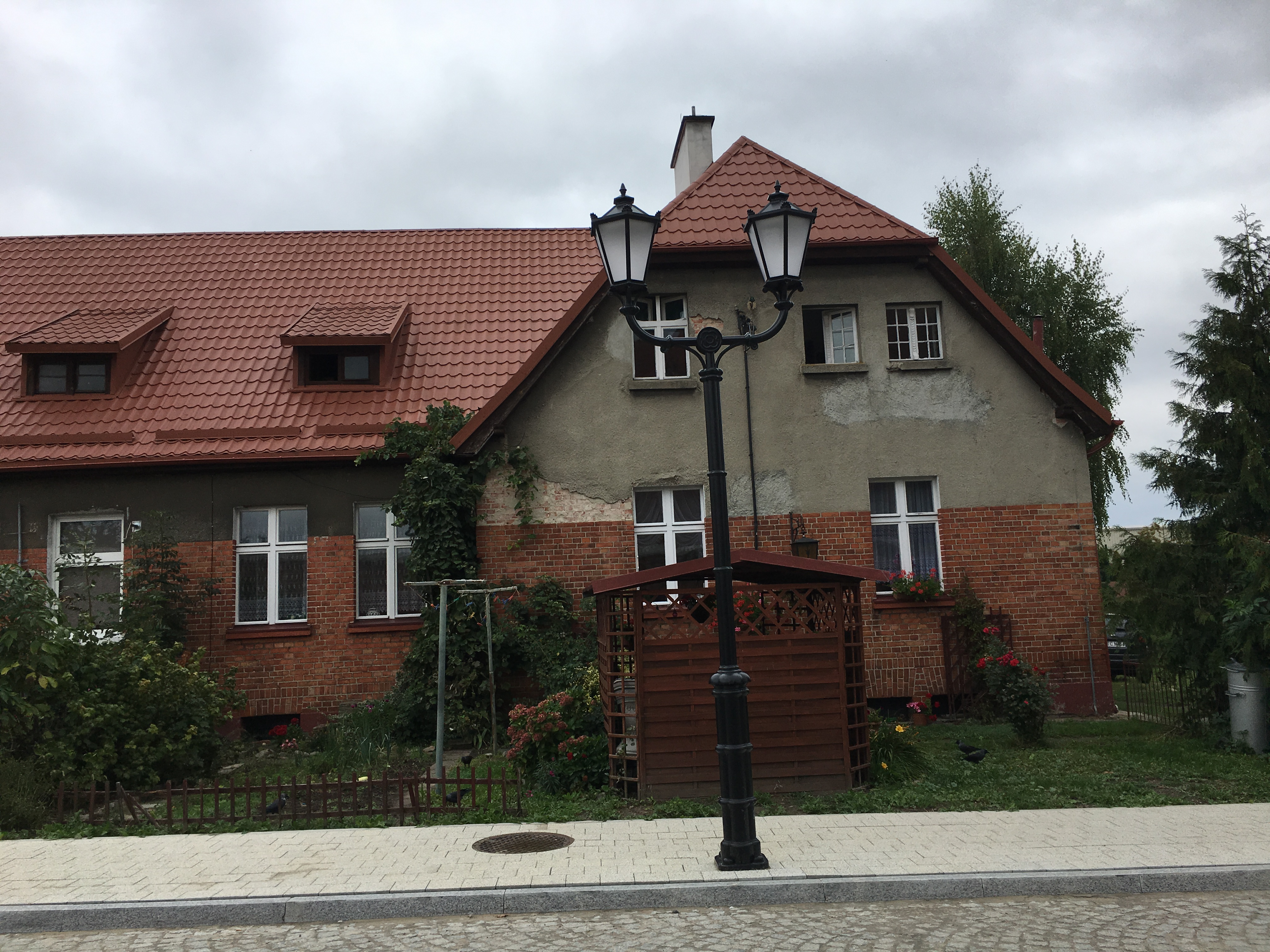 Dom i latarnia w Gniewie. Ulica Partyzantów.